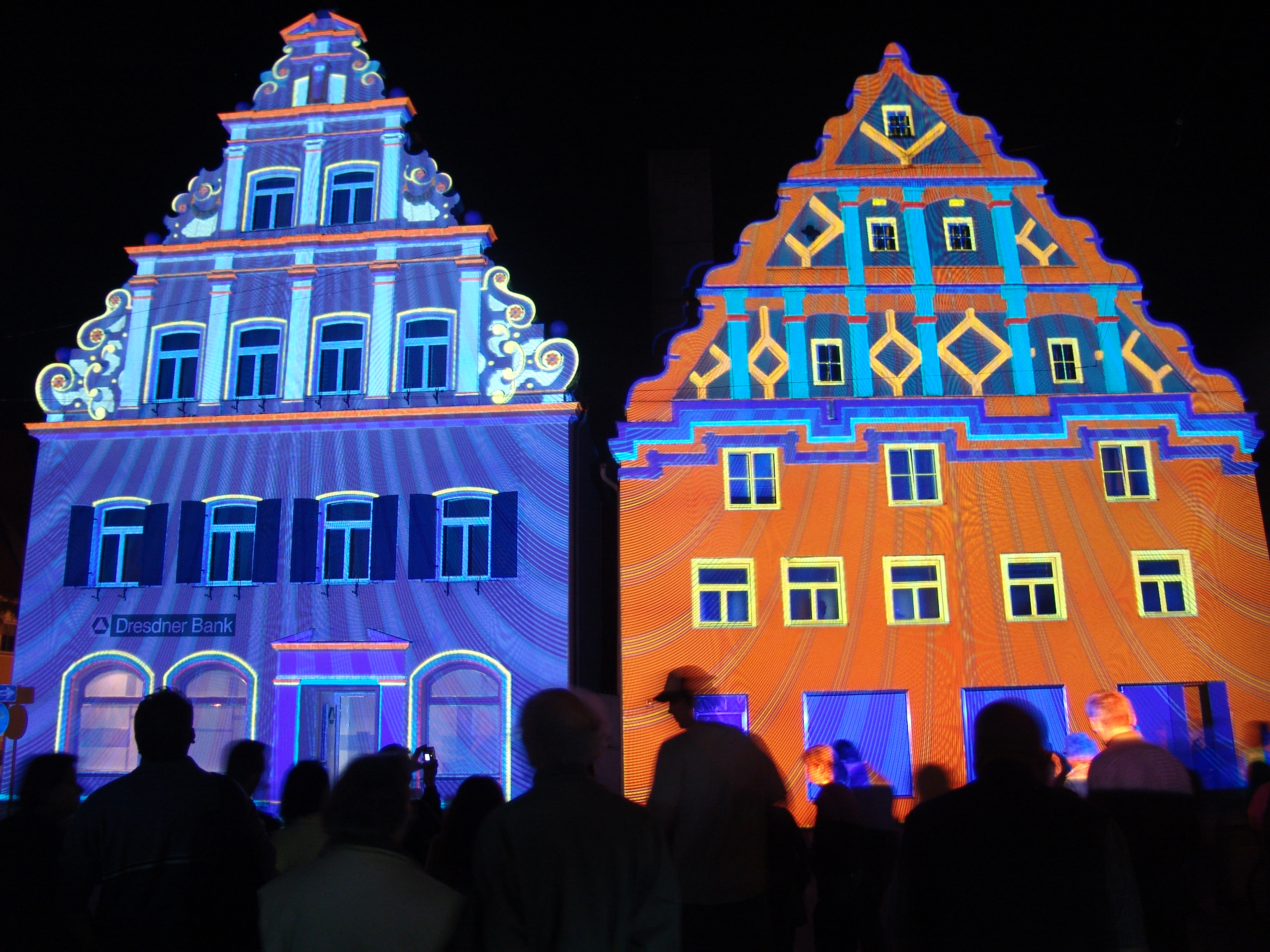 Lichtkunst-Installation in Nördlingen, Gruppe Casa Magica vom 21. bis 23. September 2006, ausgestellt durch den Kunstverien Nördlingen.